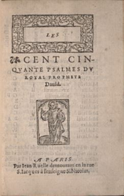 Page de titre des 150 psaumes de Marot et Poitevin (Paris : Jean Ruelle, [1554 ?])